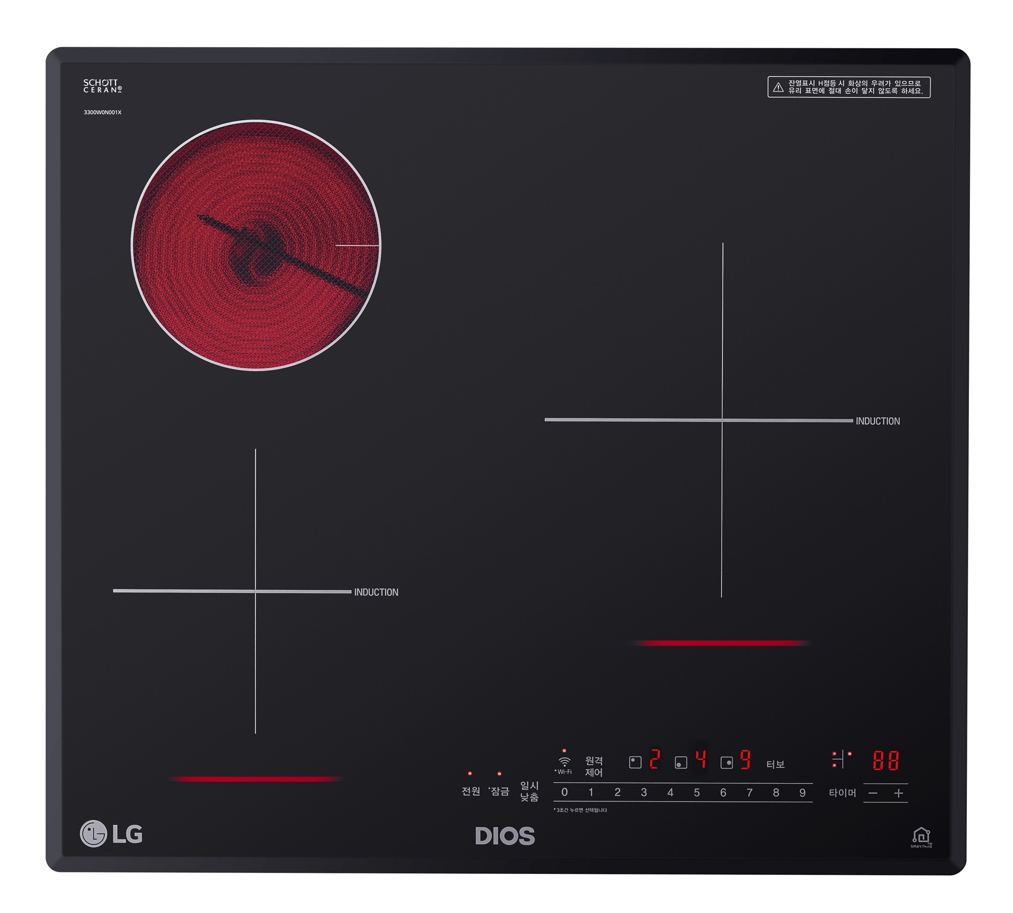 ■ 디오스 전기레인지 성장세 가속...올 2분기 판매량은 지난해 같은 기간의 약 2.5배 ■ 인기 비결은 탁월한 조리성능은 물론 뛰어난 디자인, 위생, 안전, 편의성까지